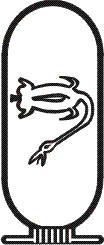 Kartuschenname des Sened in der Sakkara-Liste